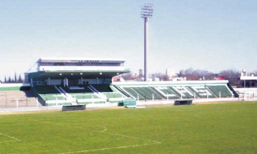 Estadio "Eva Perón" del Club Atlético Sarmiento. (Germán Ramos, 2006)